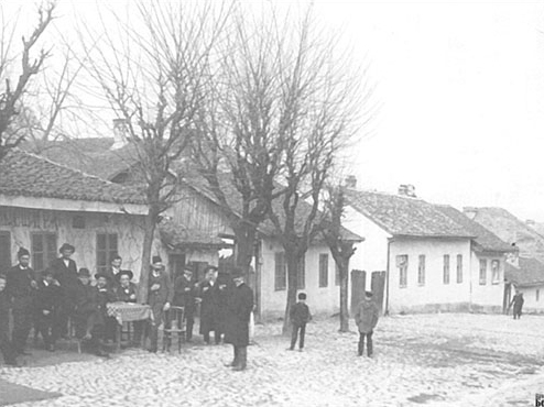 Kafane u Beogradu, početkom 20 veka - Kafana "Tri šešira" u Skadarliji